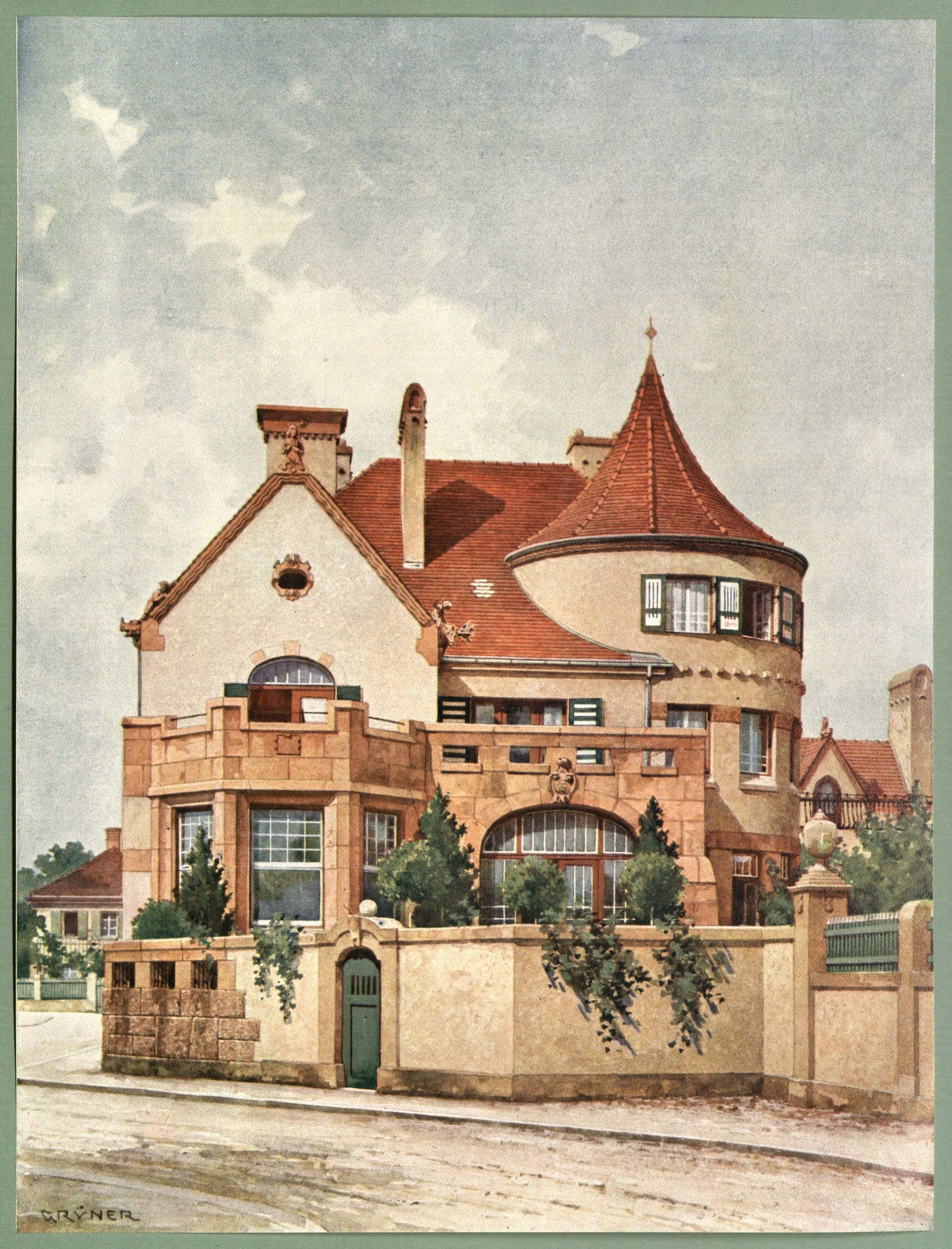 Villa Lautenbacher (Seidlvilla) in München-Schwabing, Architekt: Emanuel von Seidl. Tafel 52 aus Oscar Grüner: Moderne Villen in Meisteraquarellen. Serie II. 64 Tafeln. Verlag Friedrich Wolfrum & Co. Wien und Leipzig ca. 1905.